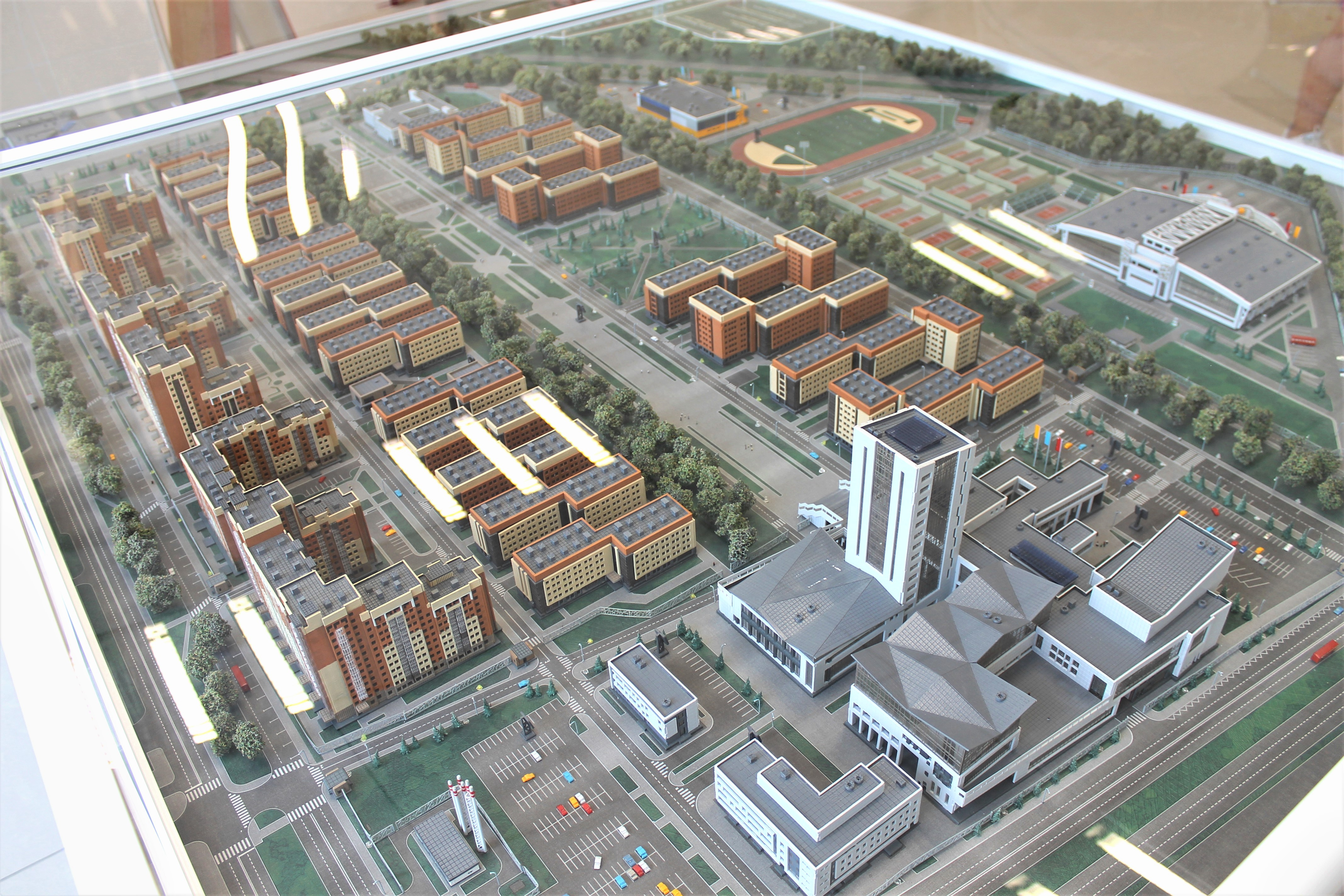 Казань. Макет Деревни Универсиады, выставленный в Международном информационном центре во время проведения летних студенческих игр (июль 2013).